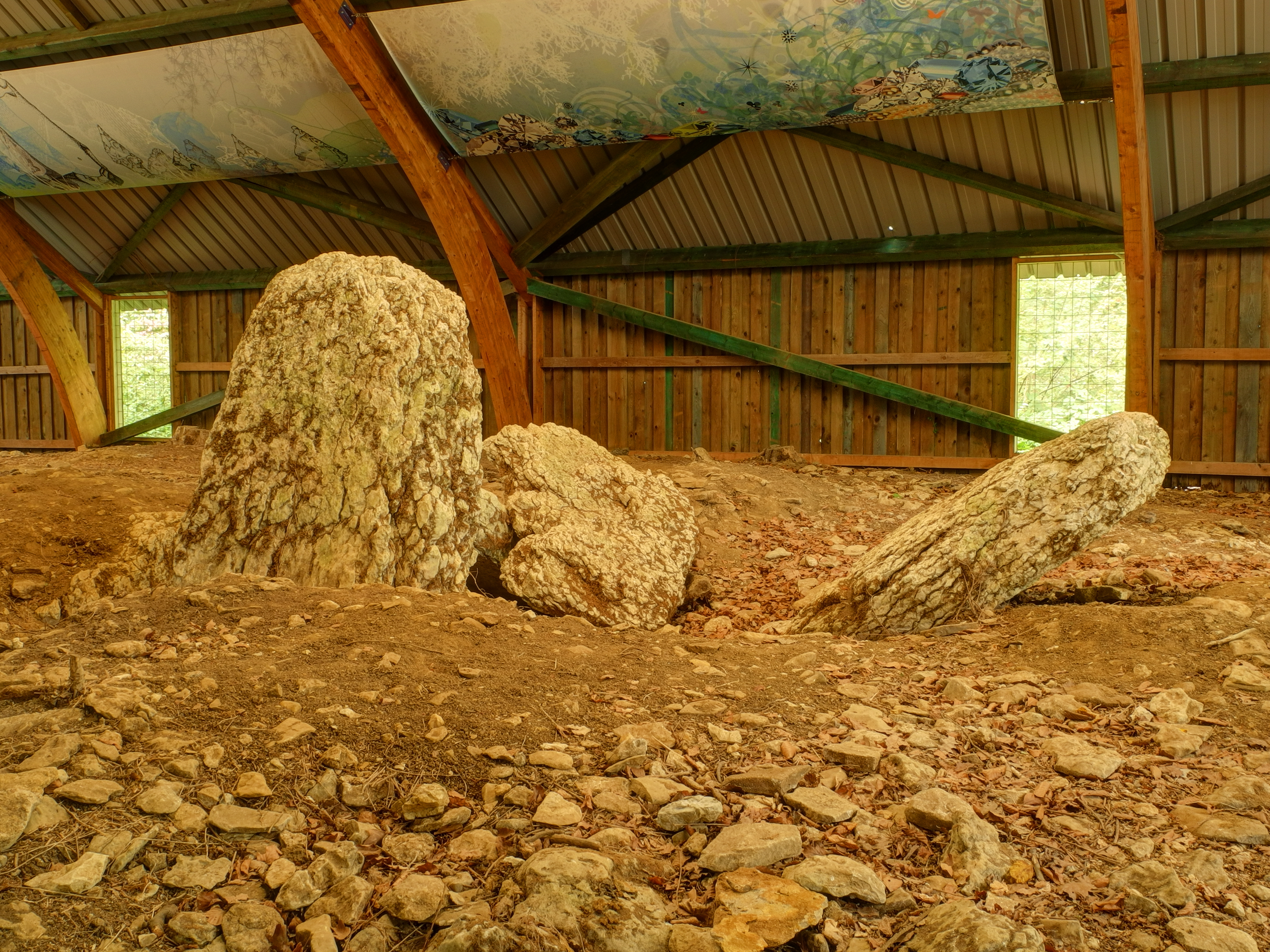 Dolmen de Brevilliers, classé Monument Historique sous le n° PA00102125 (HDR).